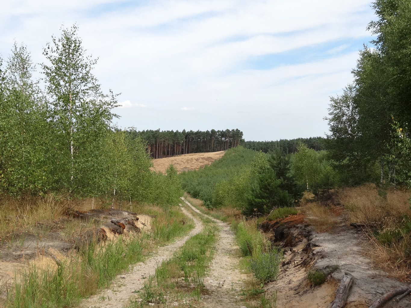 Puszcza Bydgoska w pobliżu miejscowości Stryszek